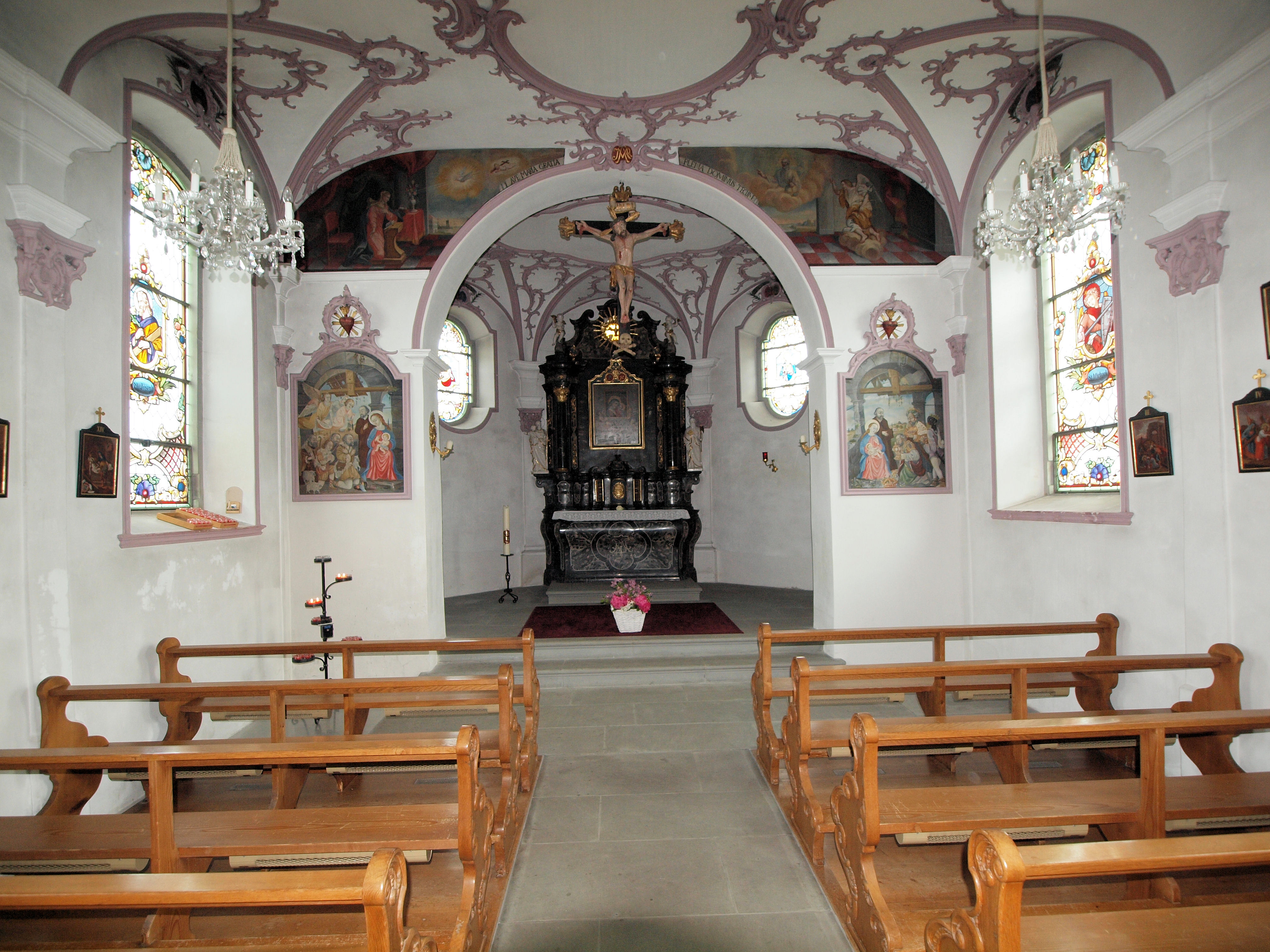 Der Innenraum der Weinrebenkapelle in Hünenberg ZG. Blick vom Eingang auf den Chor.